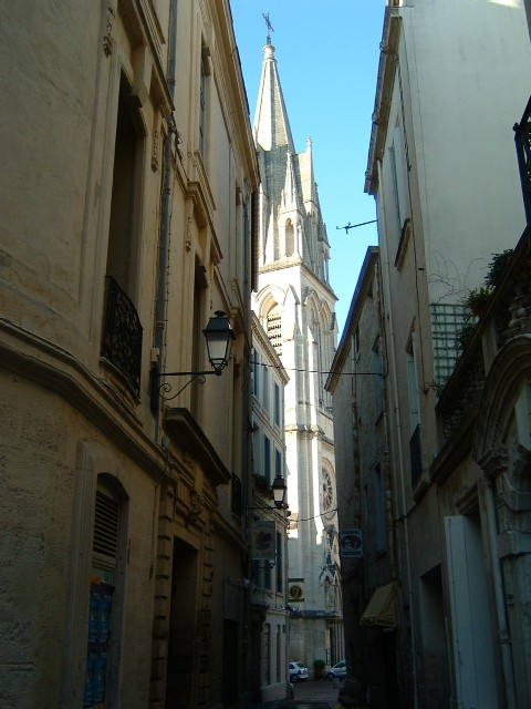 Montpellier : vue sur le carré Sainte-Anne. Photo personnelle.